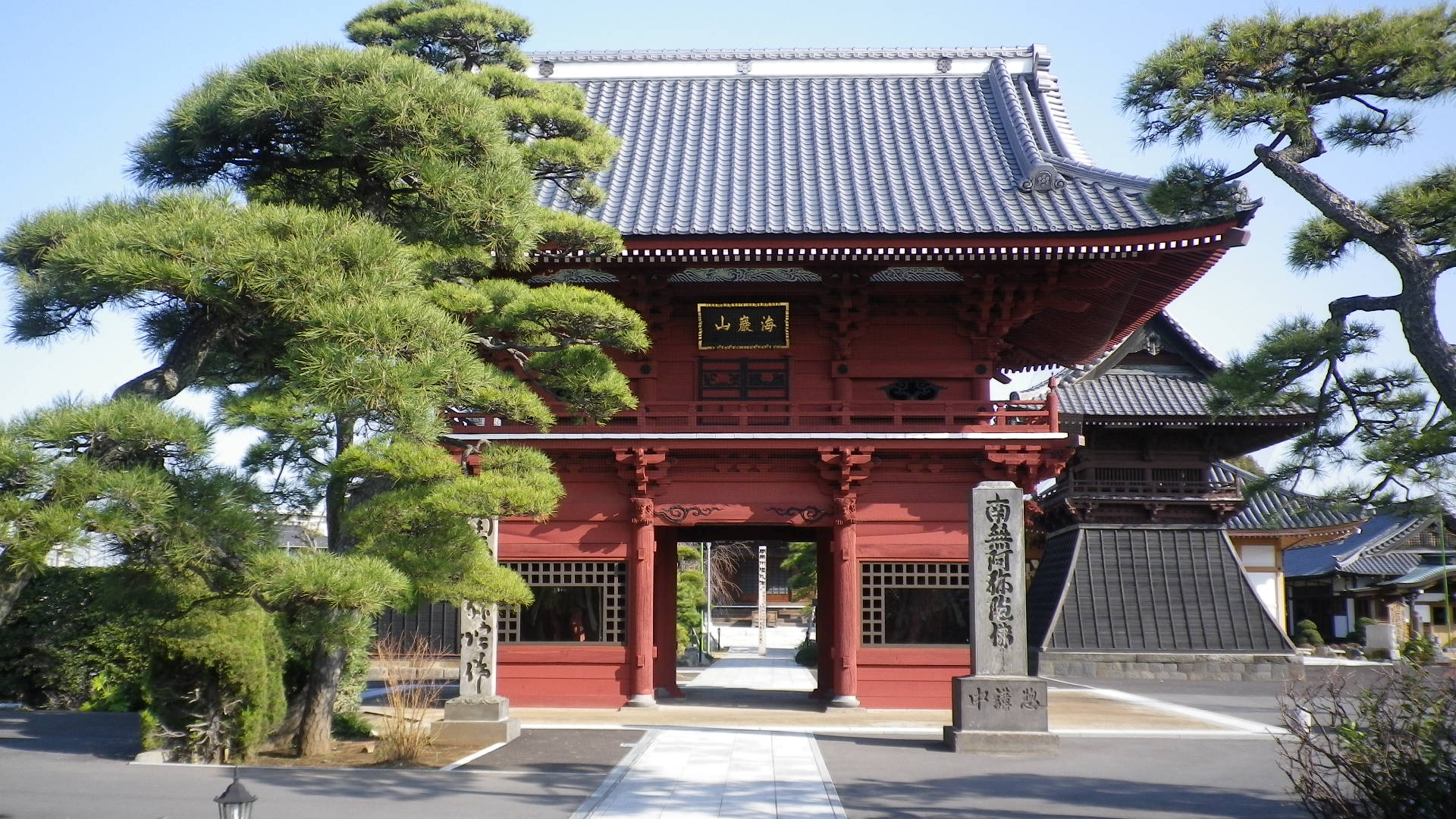 徳願寺(千葉県市川市)の山門